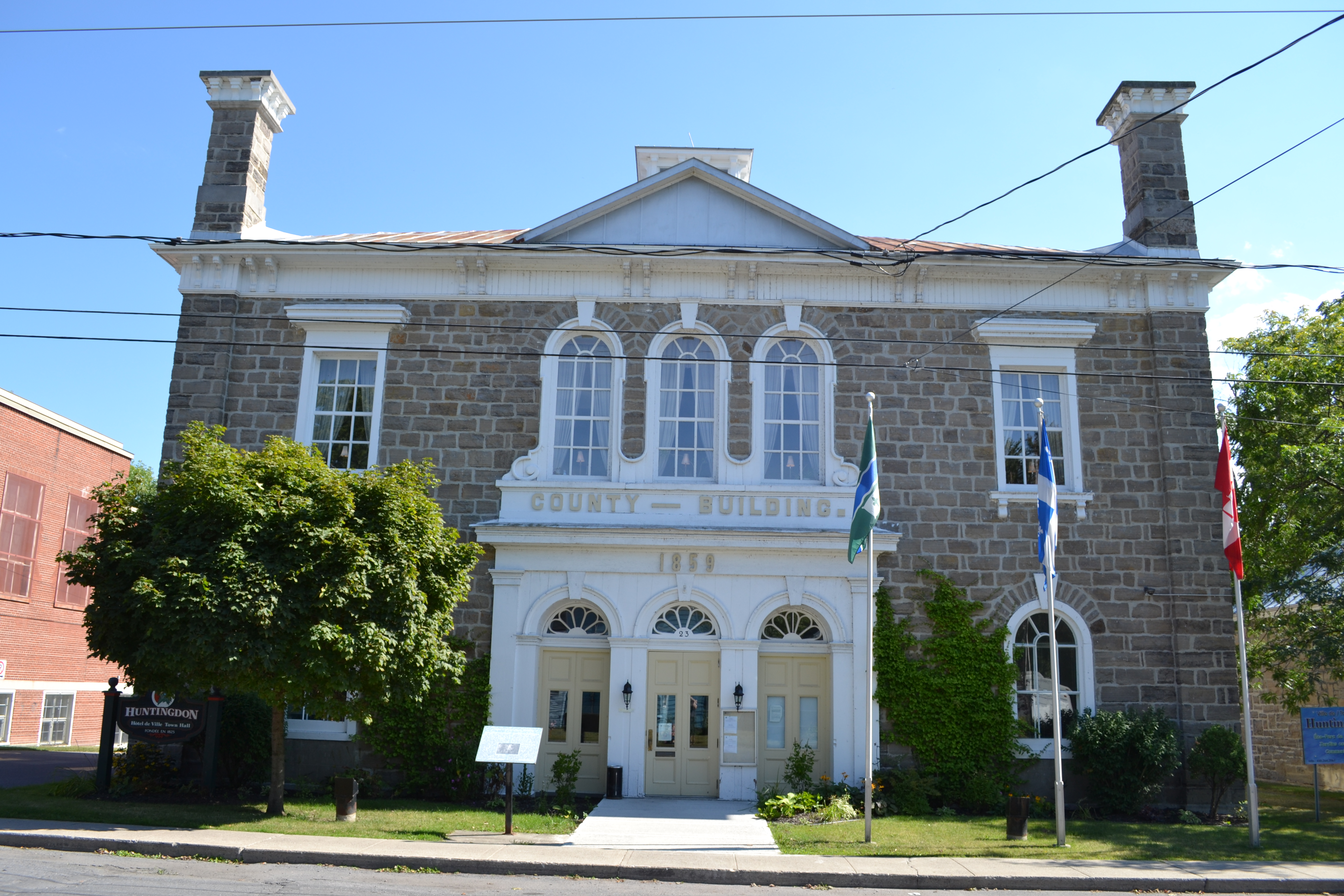 L'édifice de comté de Huntingdon est un édifice néoclassique à vocation institutionnelle érigé en 1859 et 1860 pour abriter un palais de justice de comté.